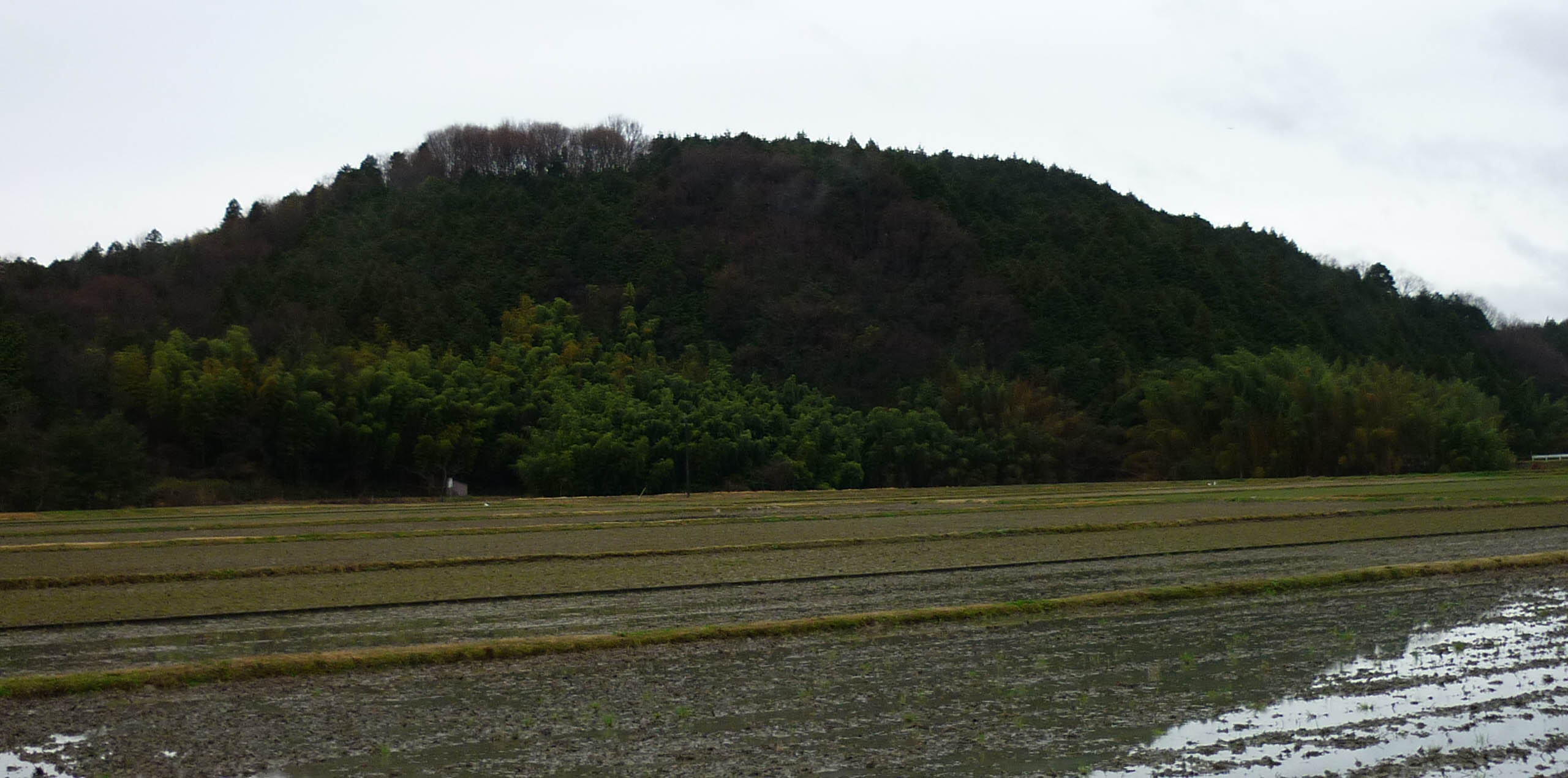 丸山